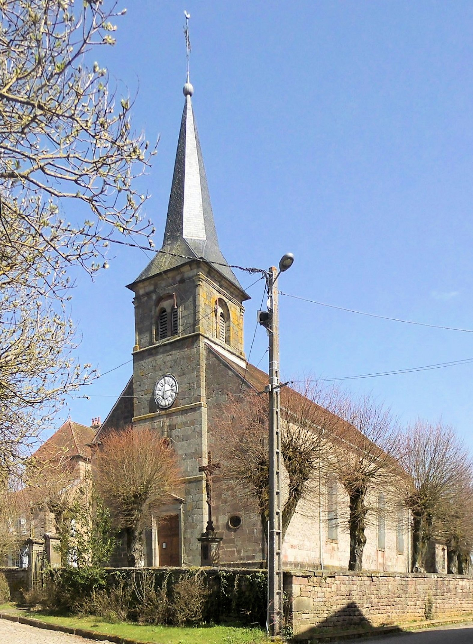 L'église Saint-Barthélemy de Fontenois-la-Ville